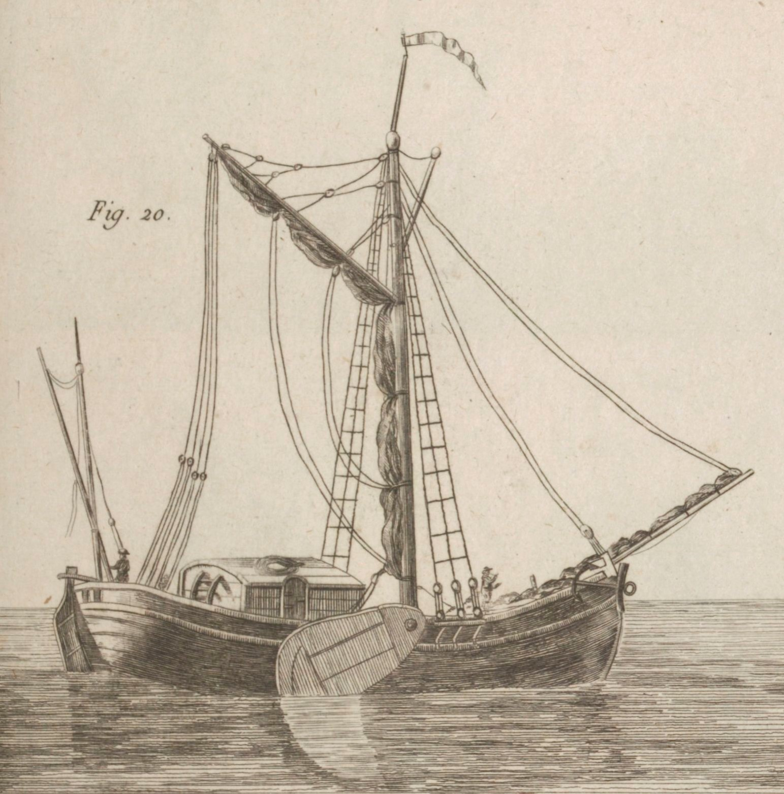 Dessin extrait du Traité pratique du gréement des vaisseaux et autres bâtiments de mer. Tome 2. 1791. Dessin de Lescallier Daniel, gravé par Petit.